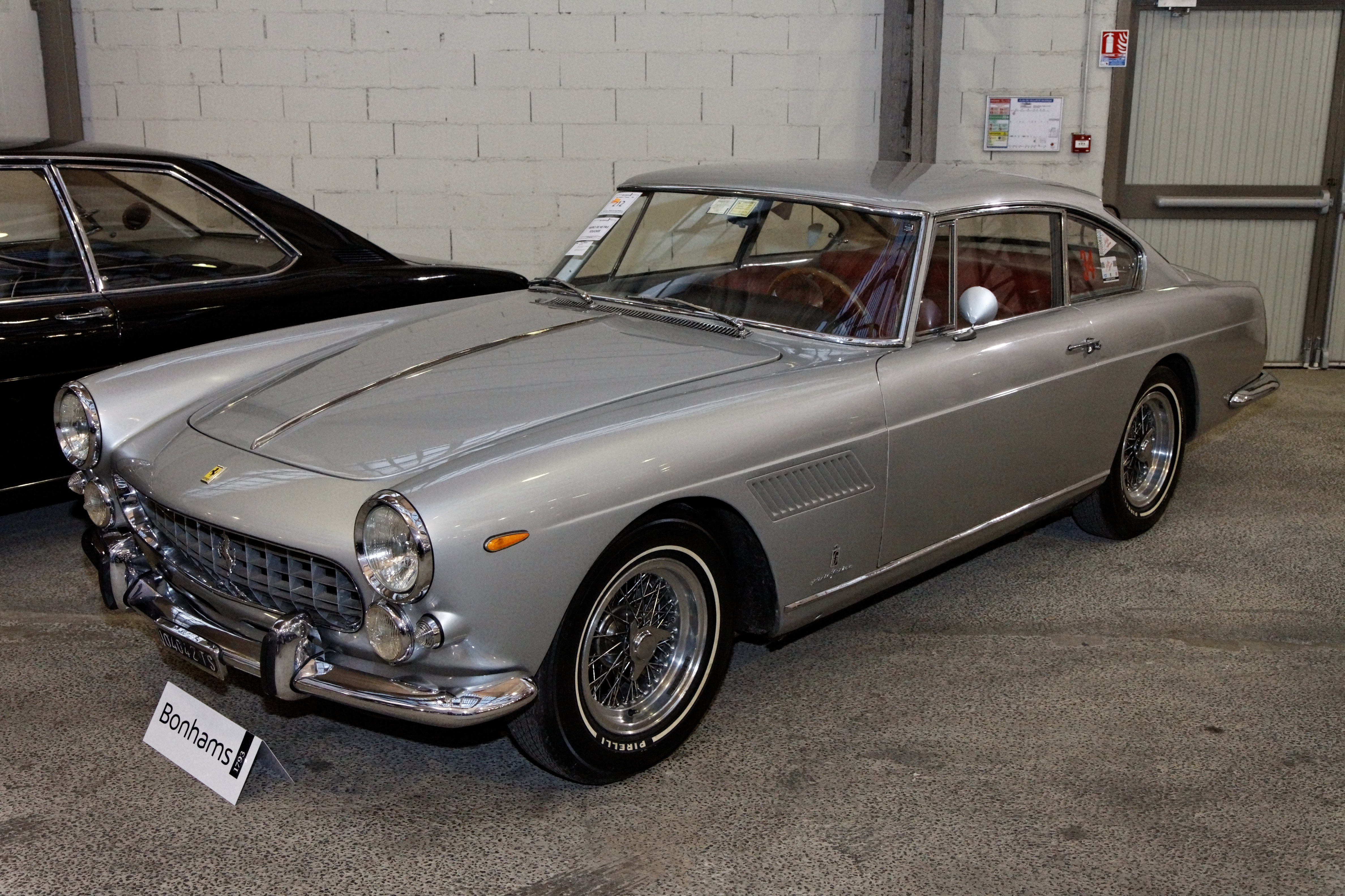 Ferrari 250 GTE 2+2 Coupé